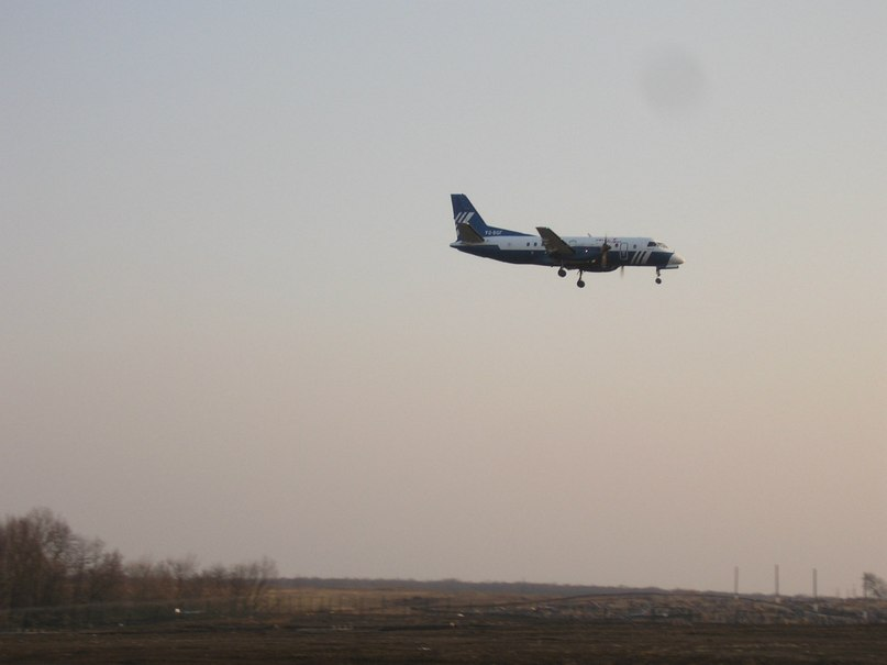 Saab340 авиакомпании "Полет" в Белгороде